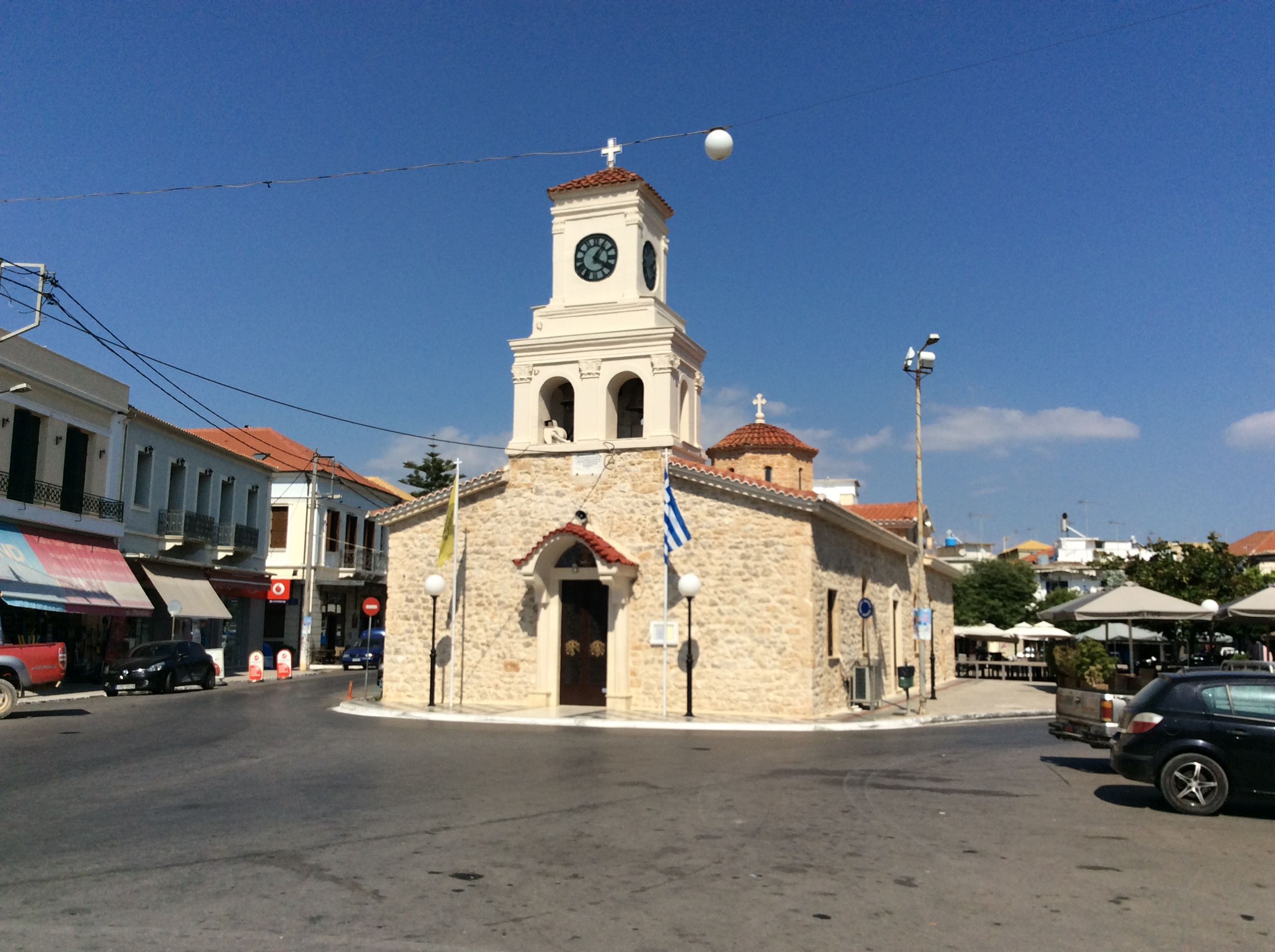 Γαργαλιάνοι Μεσσηνίας. Ο Ιερός Ναός Γεννήσεως της Θεοτόκου (Γεννέσιον της Θεοτόκου ή Γενέθλιον της Θεοτόκου) στους Γαργαλιάνους.